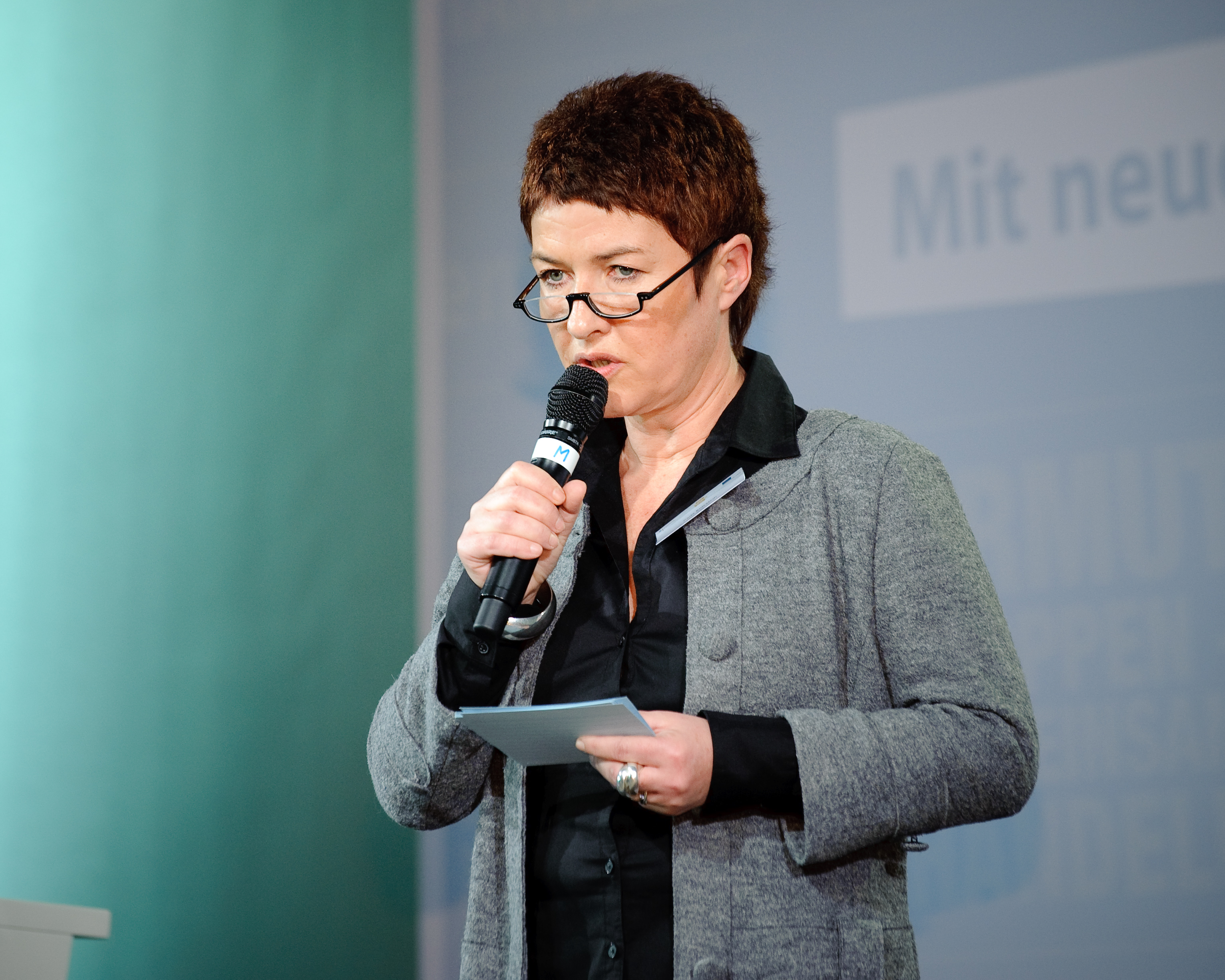 Auftaktveranstaltung Europäisches Jahr gegen Armut und soziale Ausgrenzung. Foto: Stephan Röhl